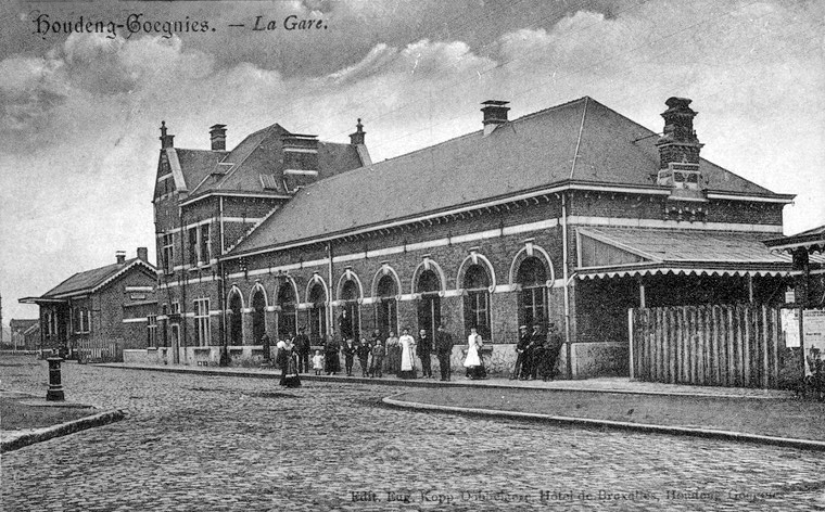 Le bâtiment de la gare vu du côté de la place.